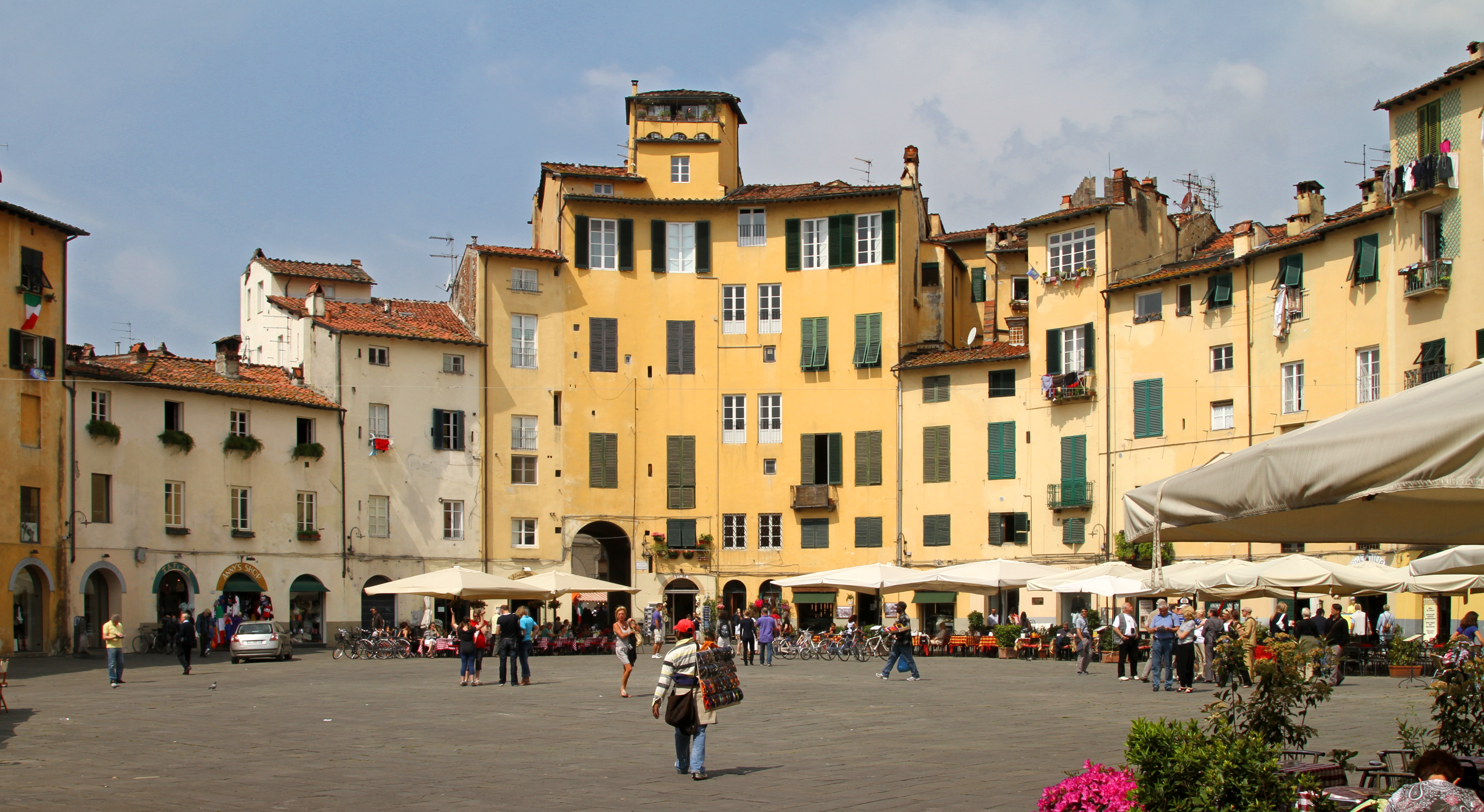 Piazza Anfiteatro